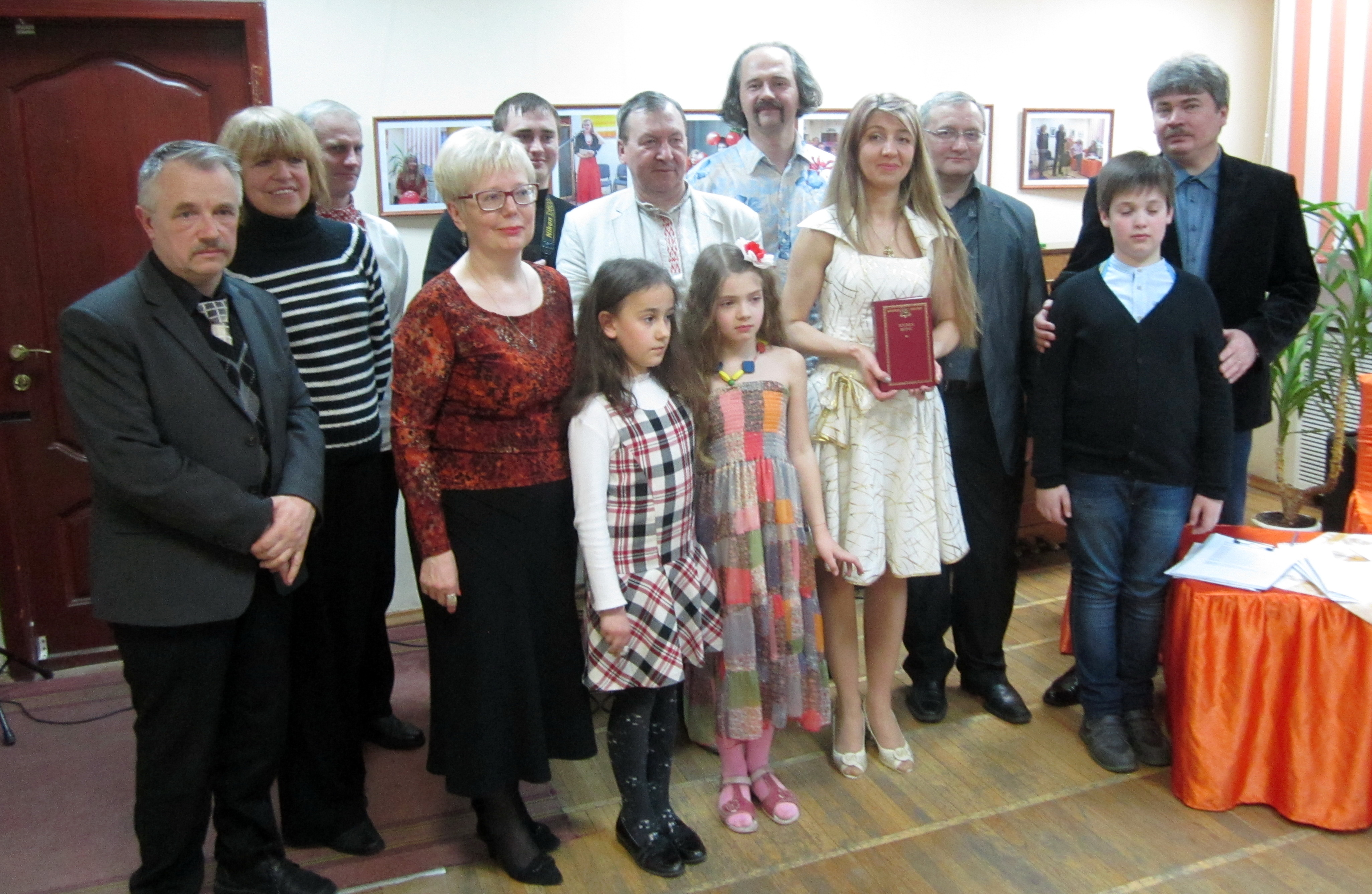 Творчая вечарына ў гонар 10-годдзя Паэтычнага тэатра «Арт.С». Выступоўцы.